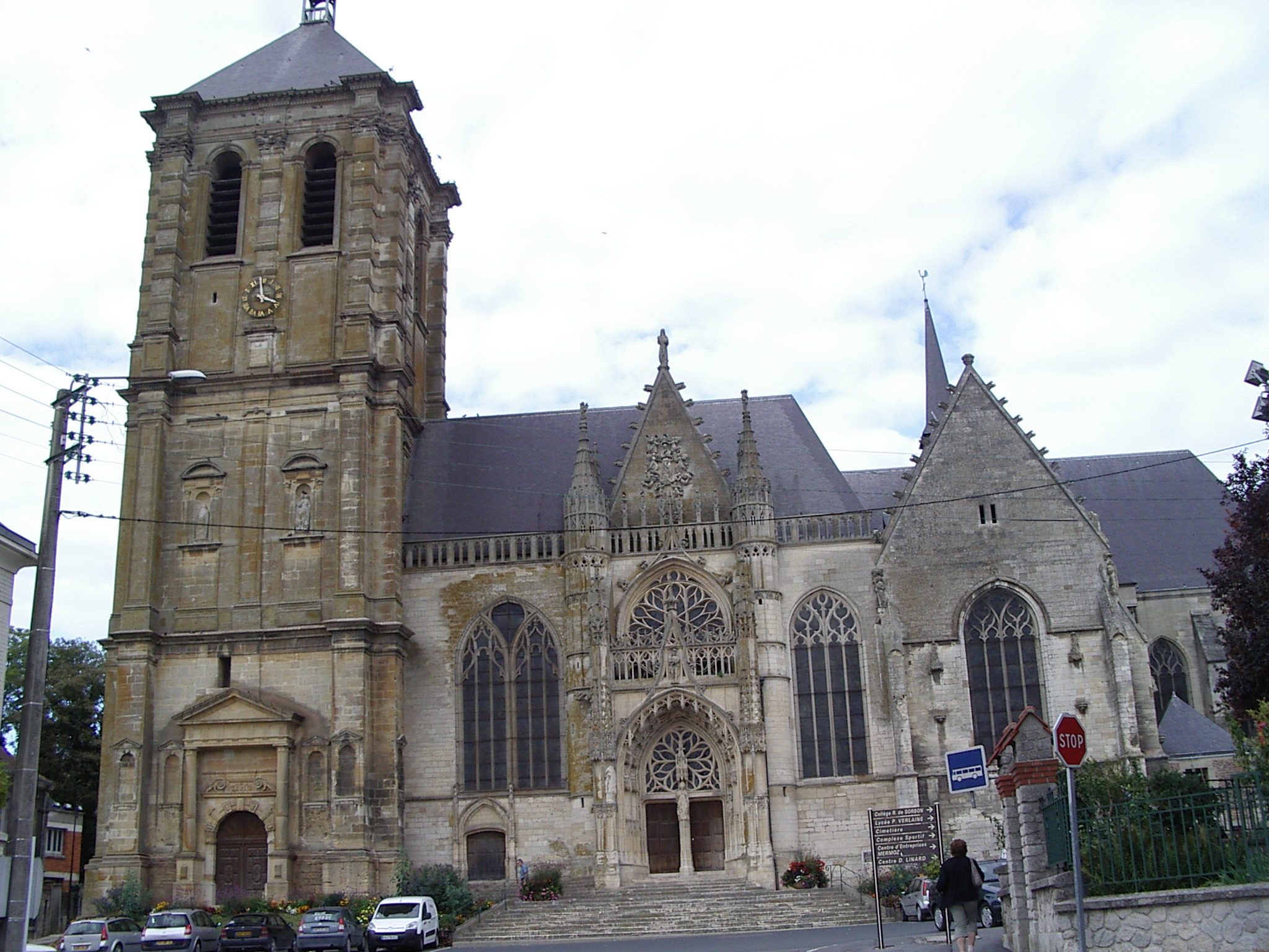 L'église Saint-Nicolas est une église catholique située à Rethel, en France